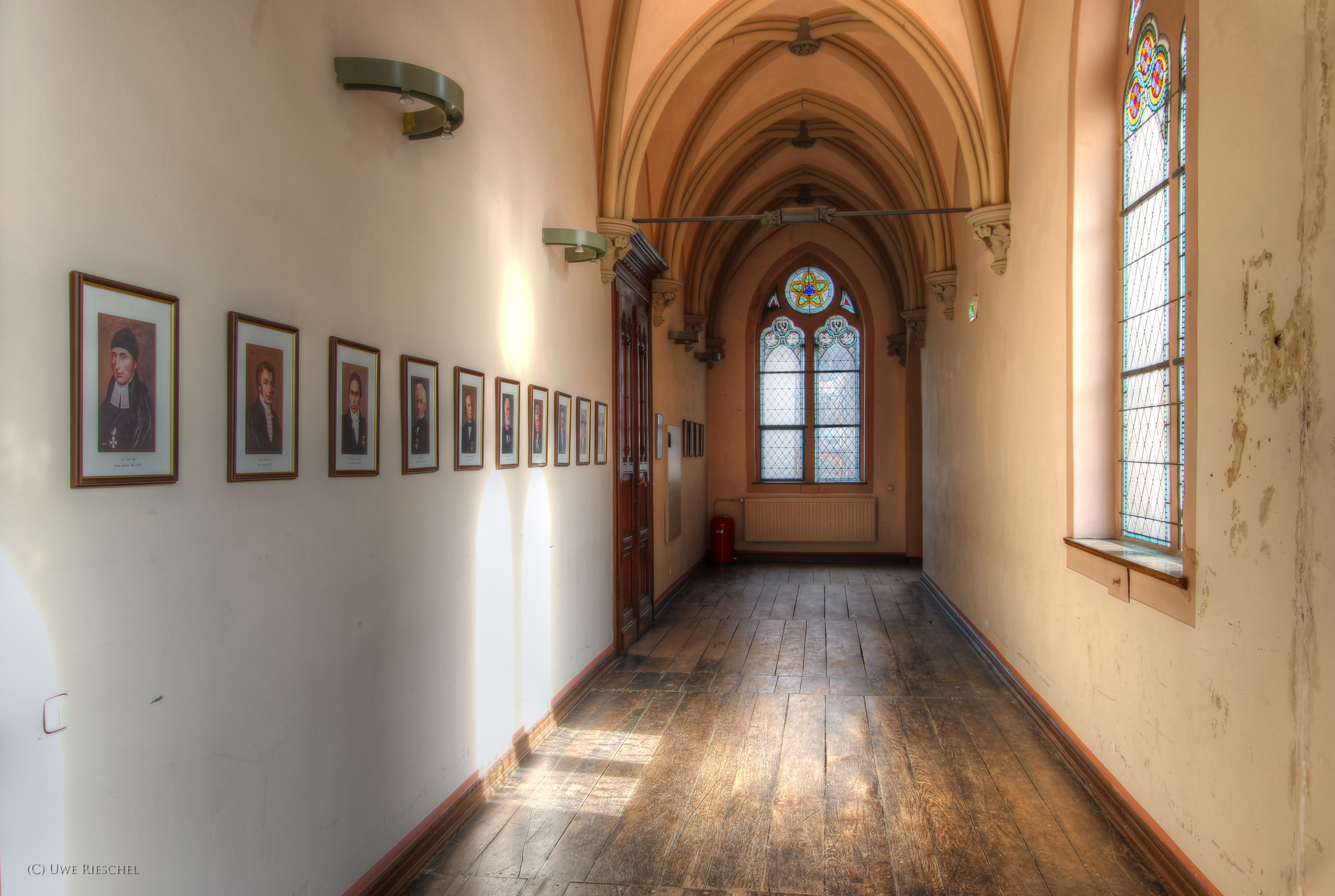 Rektorengalerie, Landesschule Pforta